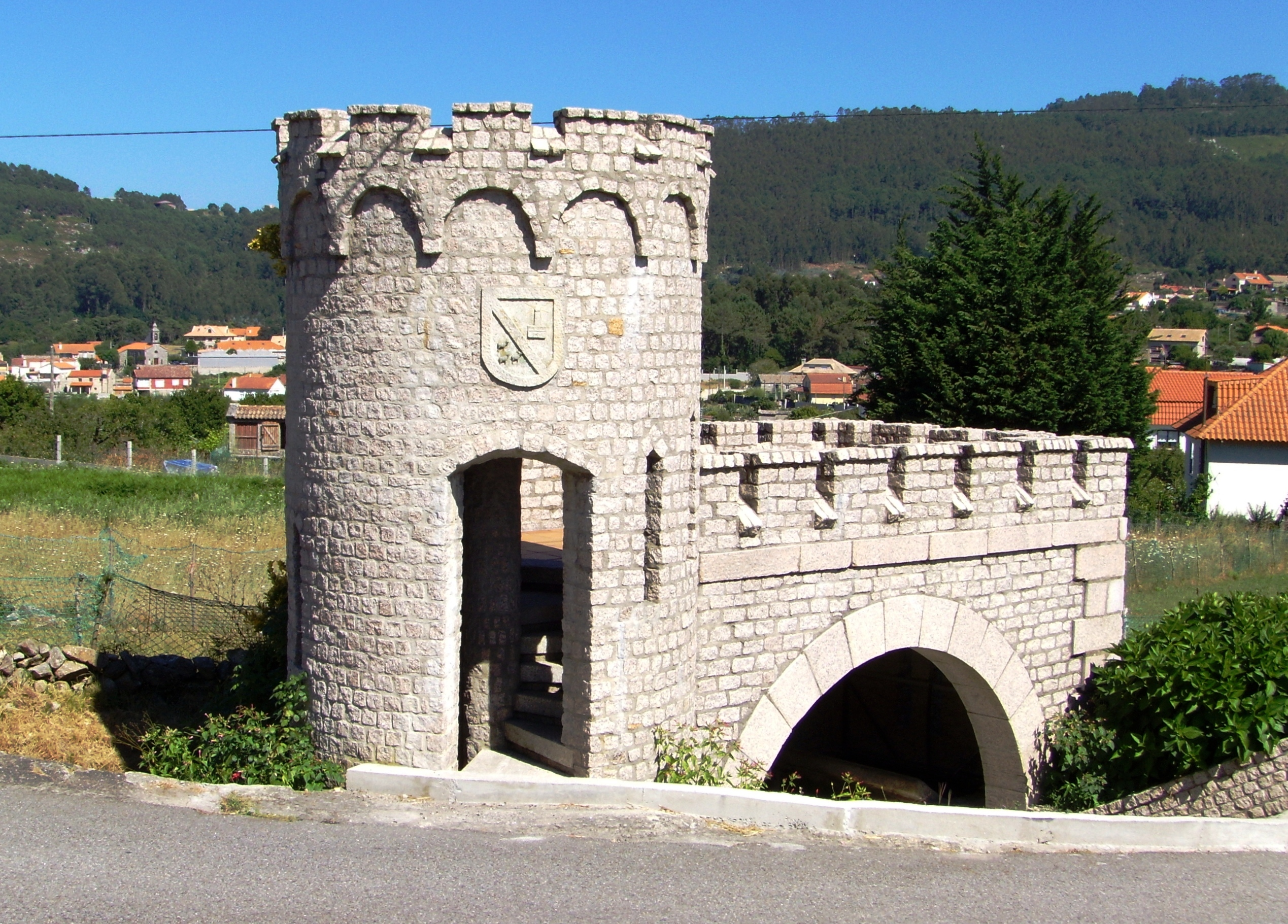 Sorprendente Lavadoiro público en Baredo, Baiona